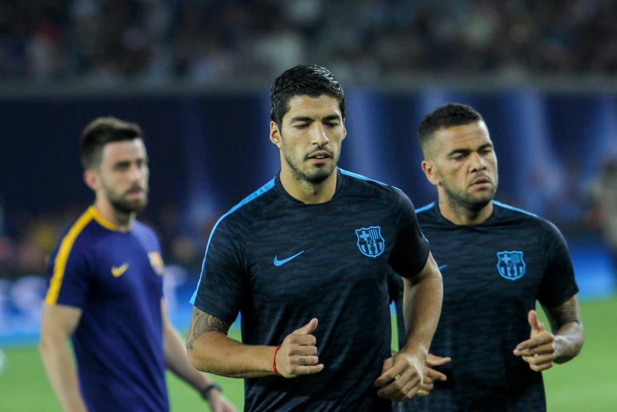 Перед матчем за Суперкубок УЄФА 2015 року у Тбілісі. Грузія